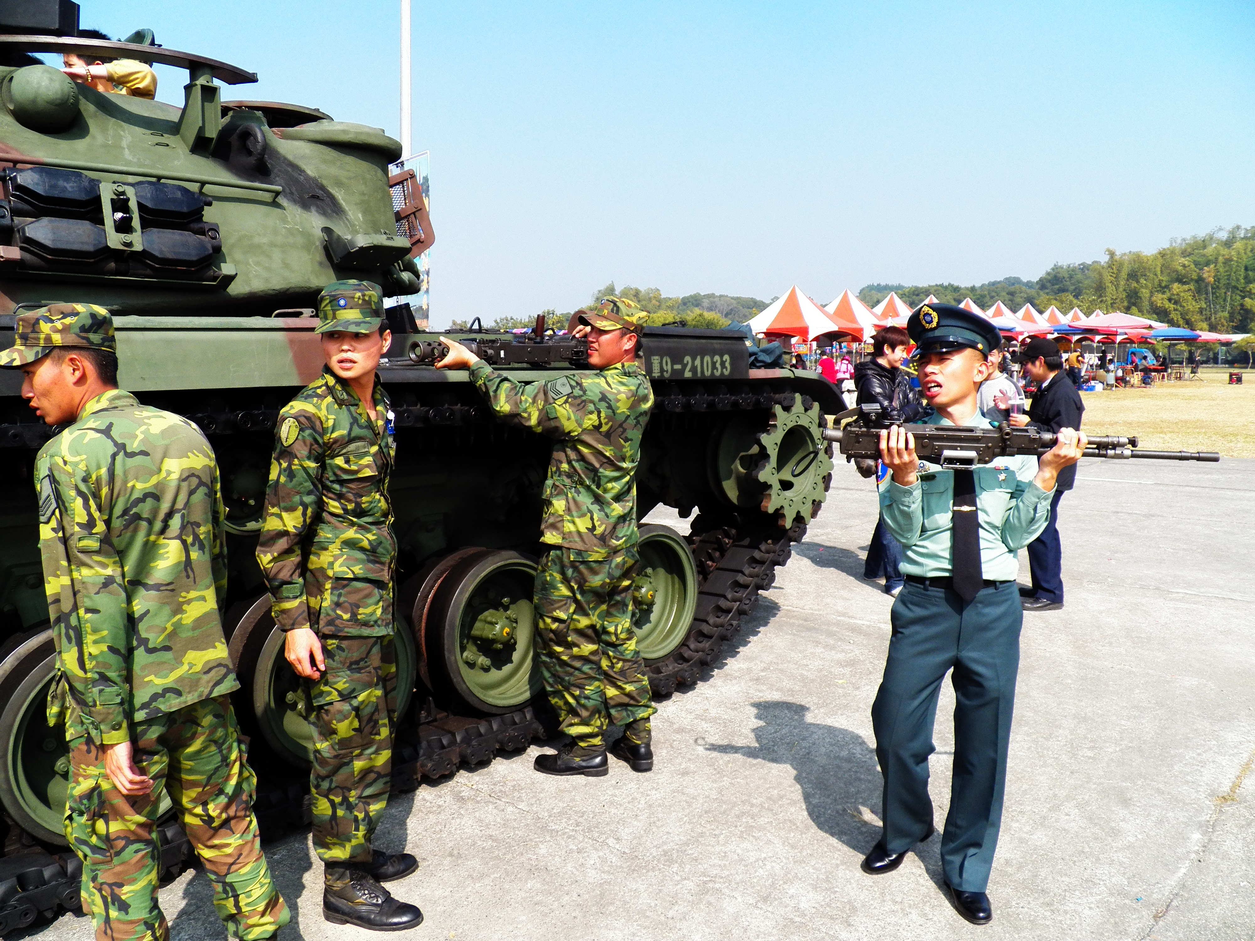 中文（台灣）: 2012年陸軍步兵學校營區開放活動尾聲，拆卸CM-12戰車砲塔機槍的官兵。